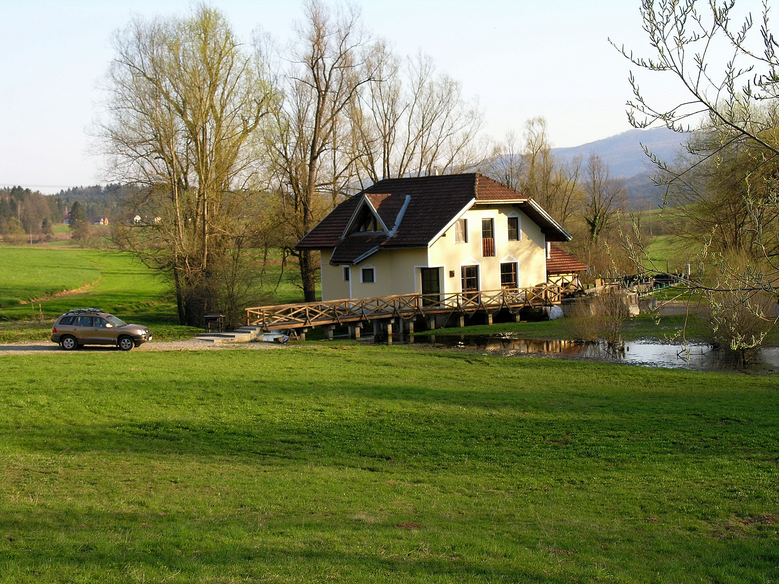 V mostiščarski Zupančičevi hiši v Jelševniku je stalna predstavitev biologije črnega močerila.